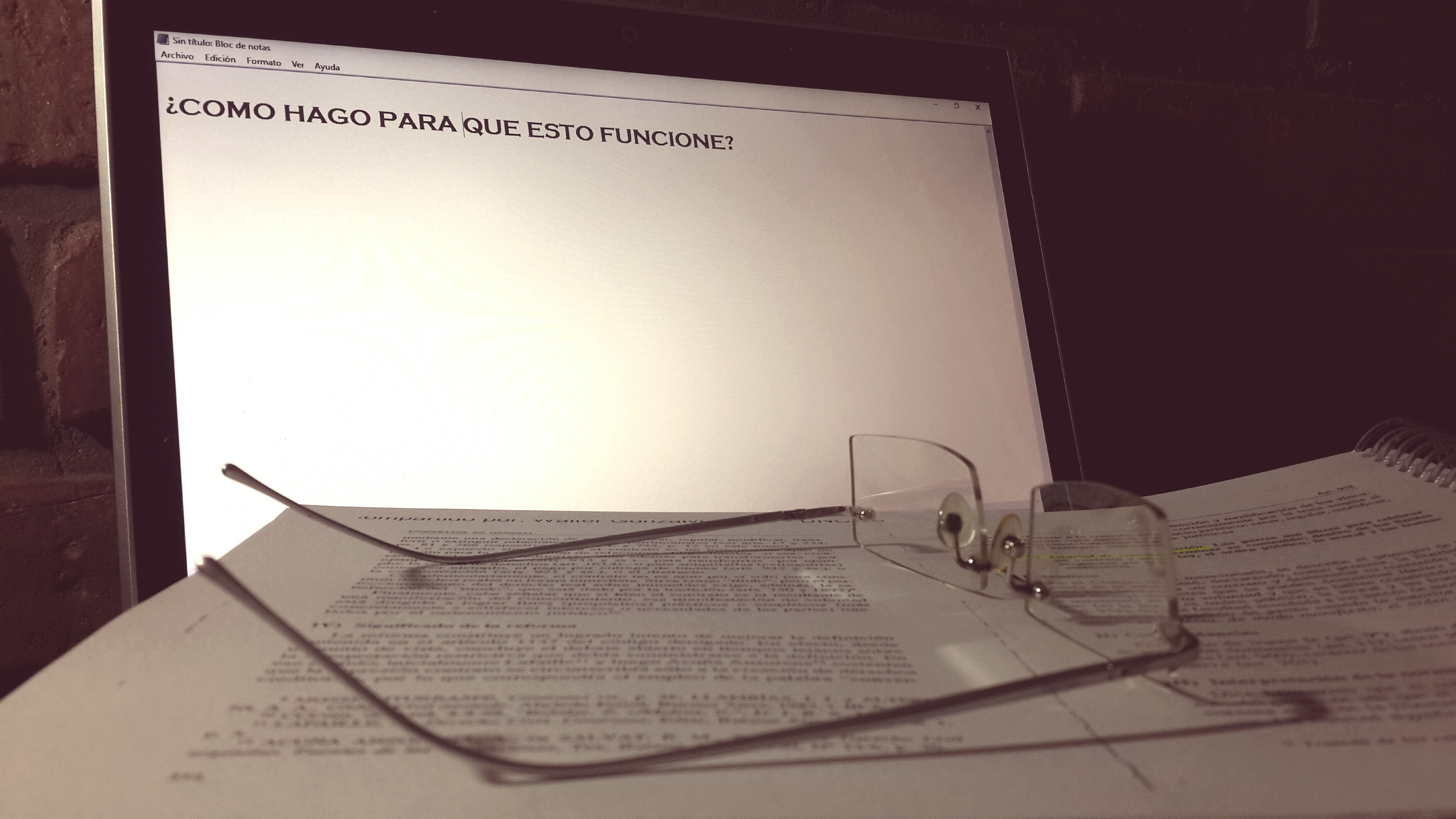 La tecnología es esencial hoy en día para el trabajo y actividades diarias.